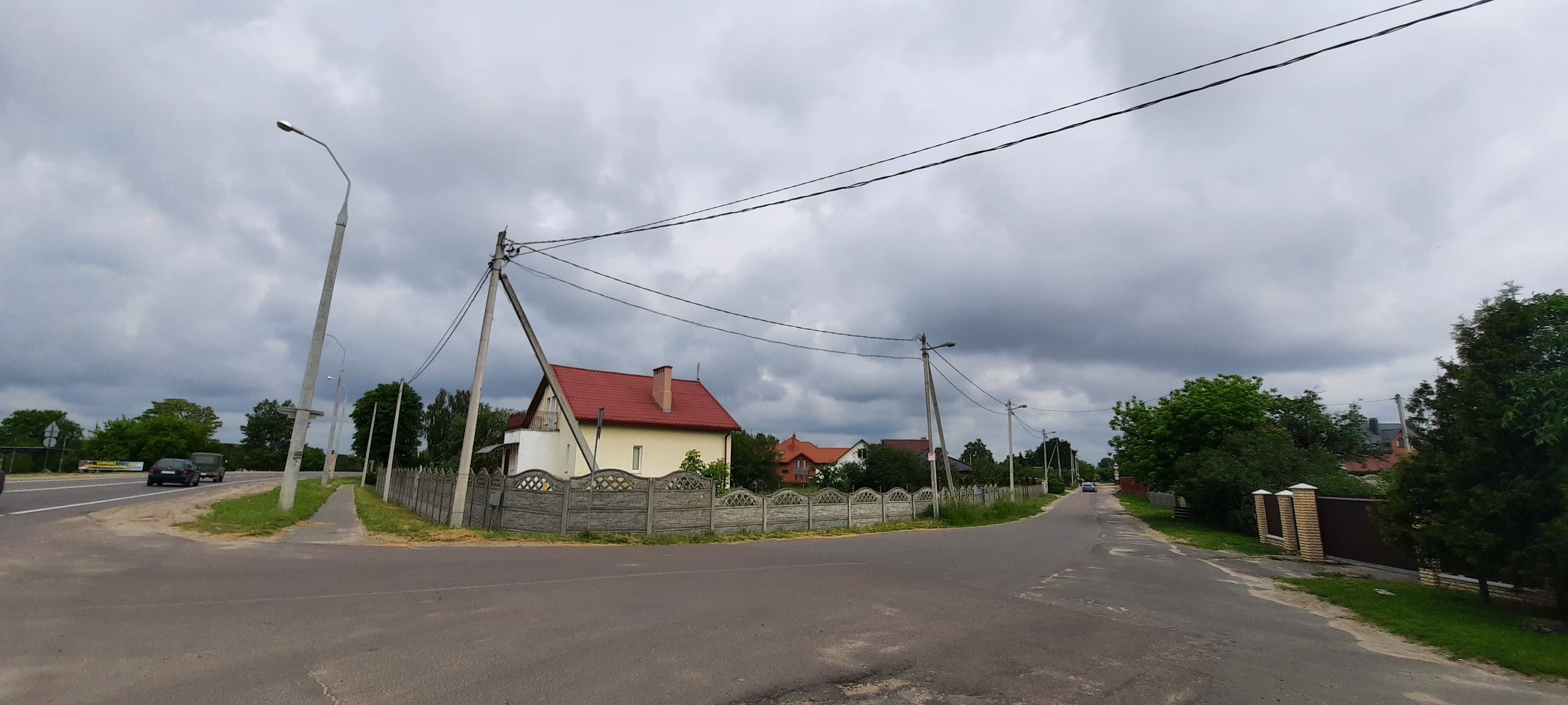 вуліца Валынская Брэста